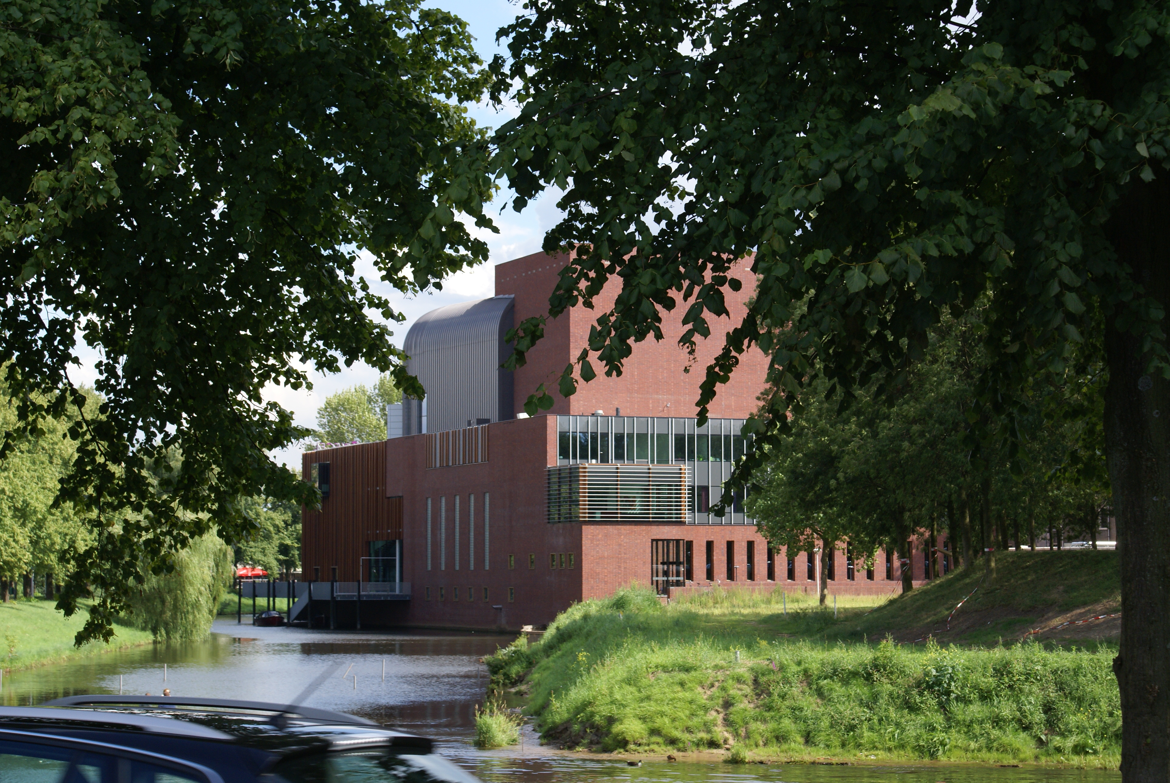 Zwolle, Theater de Spiegel